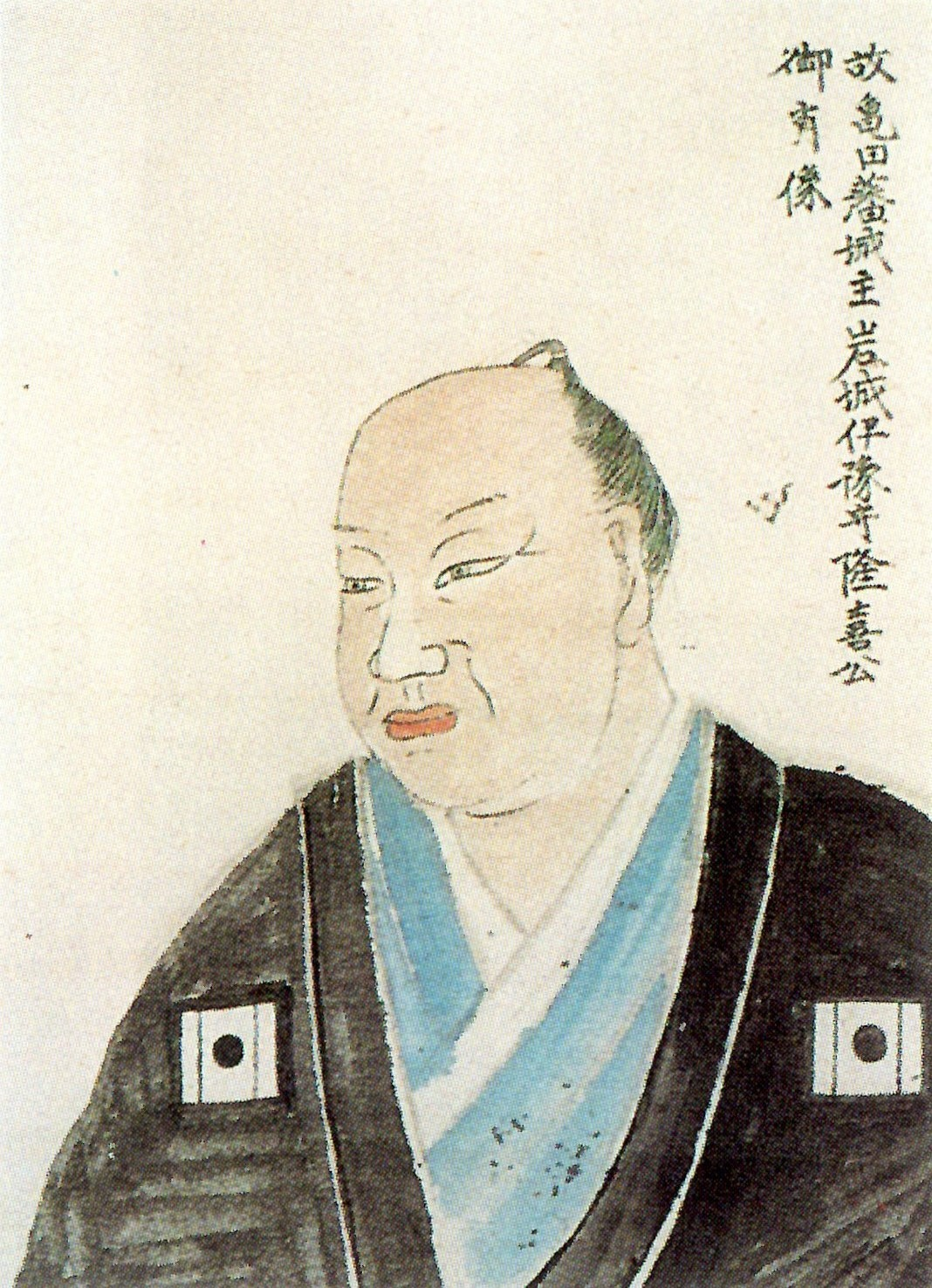 岩城隆喜の肖像。